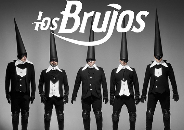 Imagen de retorno de Los Brujos, en 2014, luego de 16 años de separados